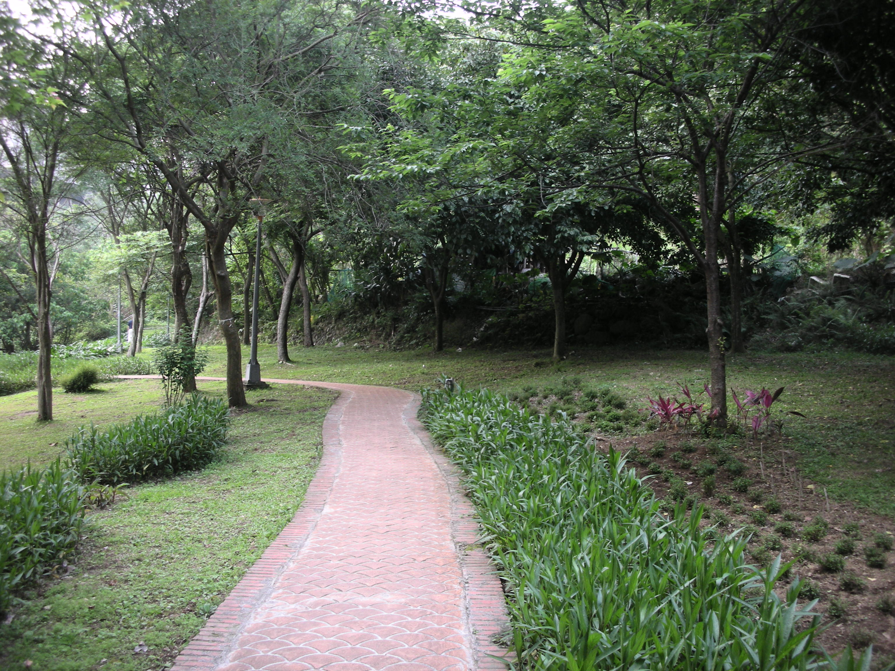 天母公園Tianmu Park